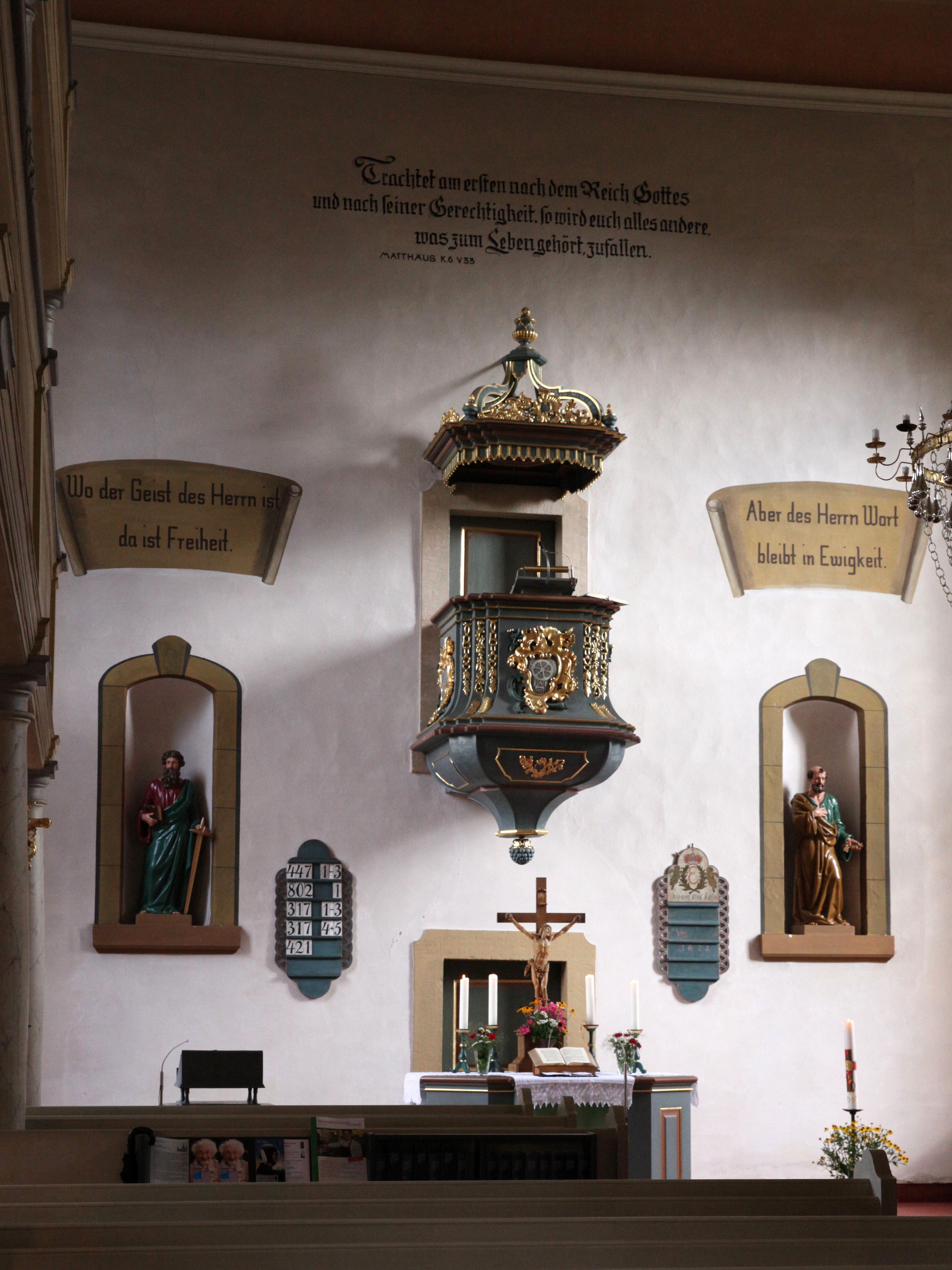 Kanzel, evangelisch-lutherische Dreifaltigkeitskirche in Weißenbrunn vorm Wald